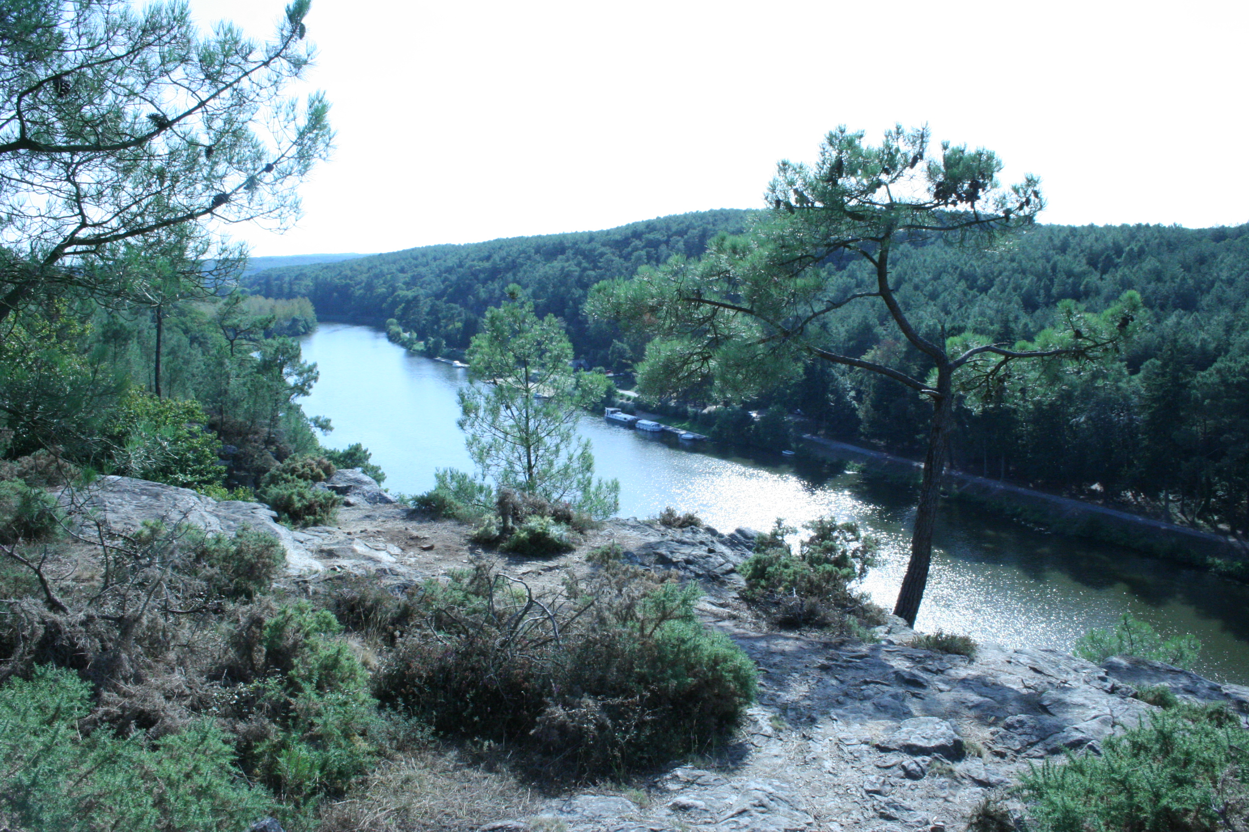 Ile aux Pies - Basse Vallée de l'Oust - France - Bretagne - Morbihan